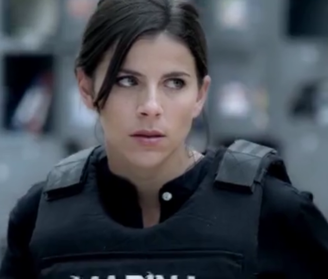 María Fernanda Yepes en trailer de La Teniente